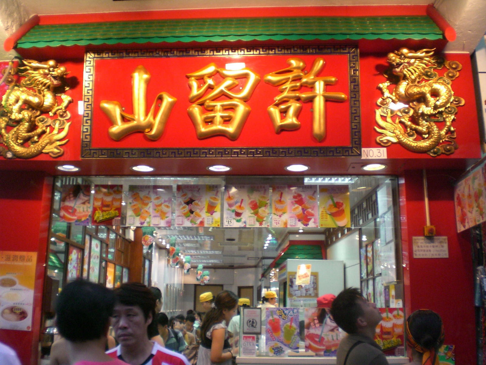 許留山, 尖沙咀, 海防道